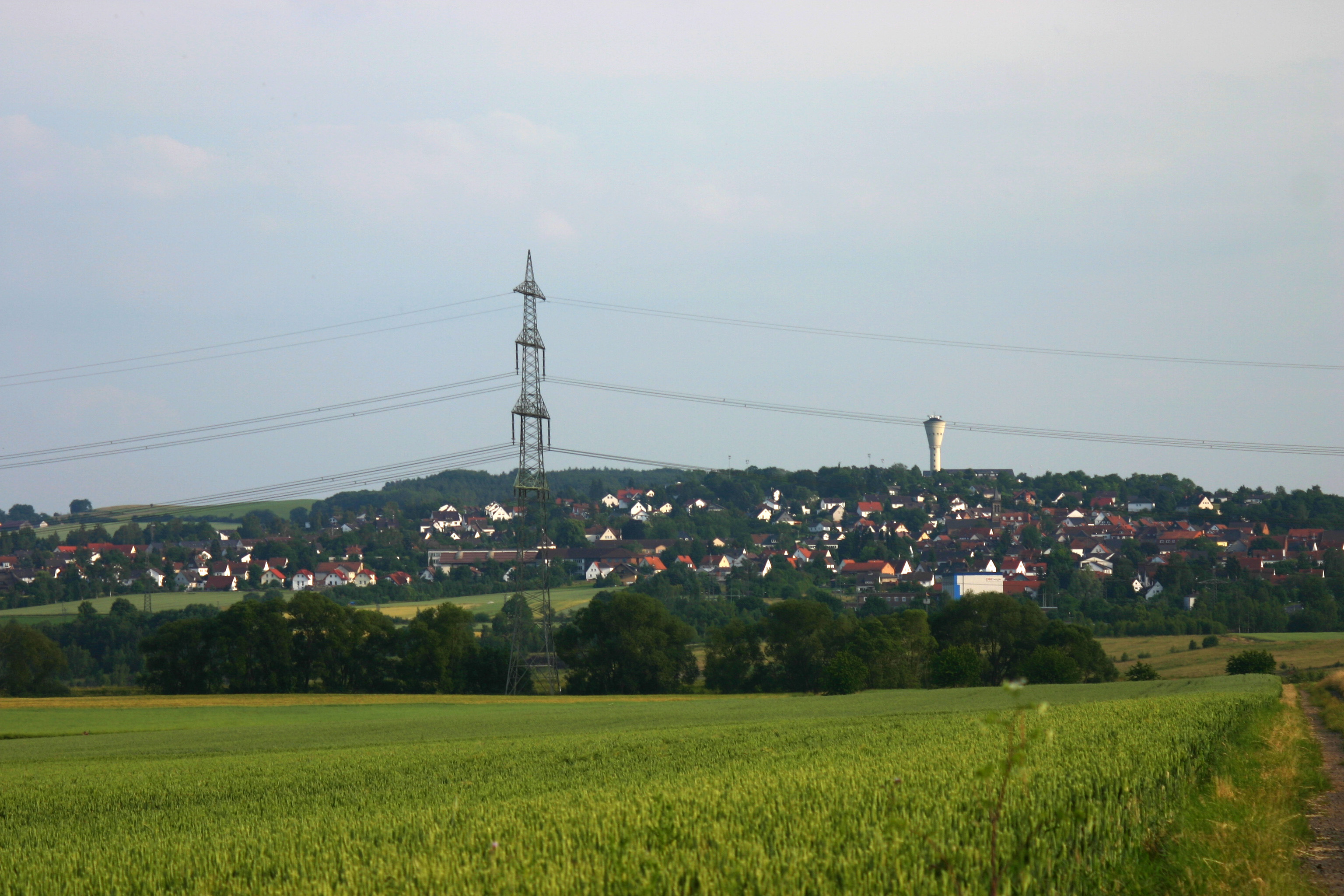 Panaroma von Borken (Hessen)